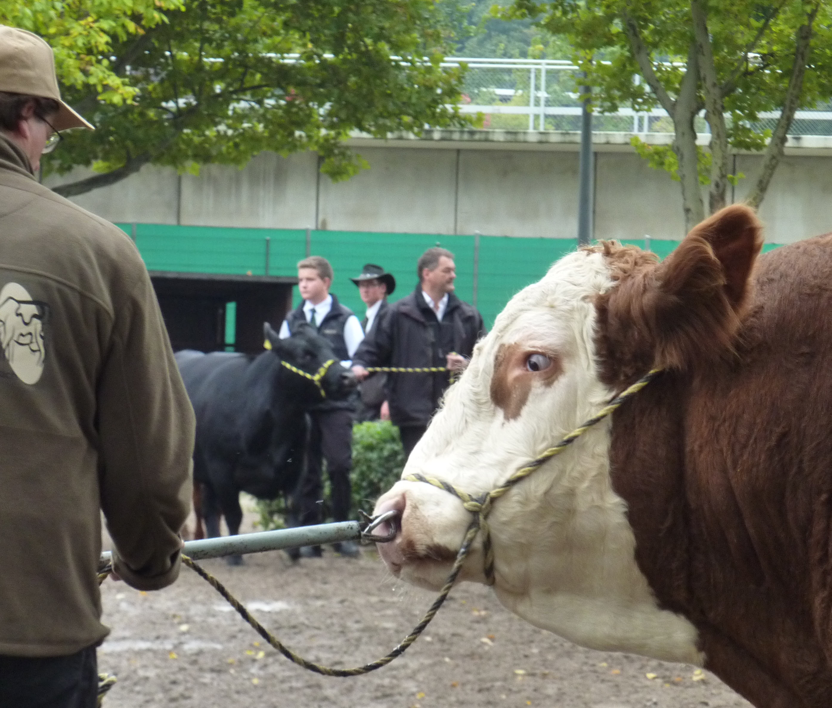 auf dem Landwirtschaftlichen Hauptfest 2010